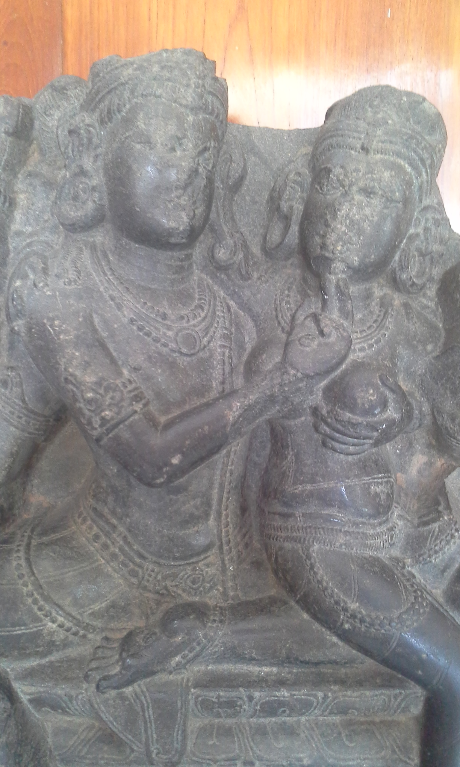 बंगलोर संग्रहालय येथील शिव पार्वती मूर्ती